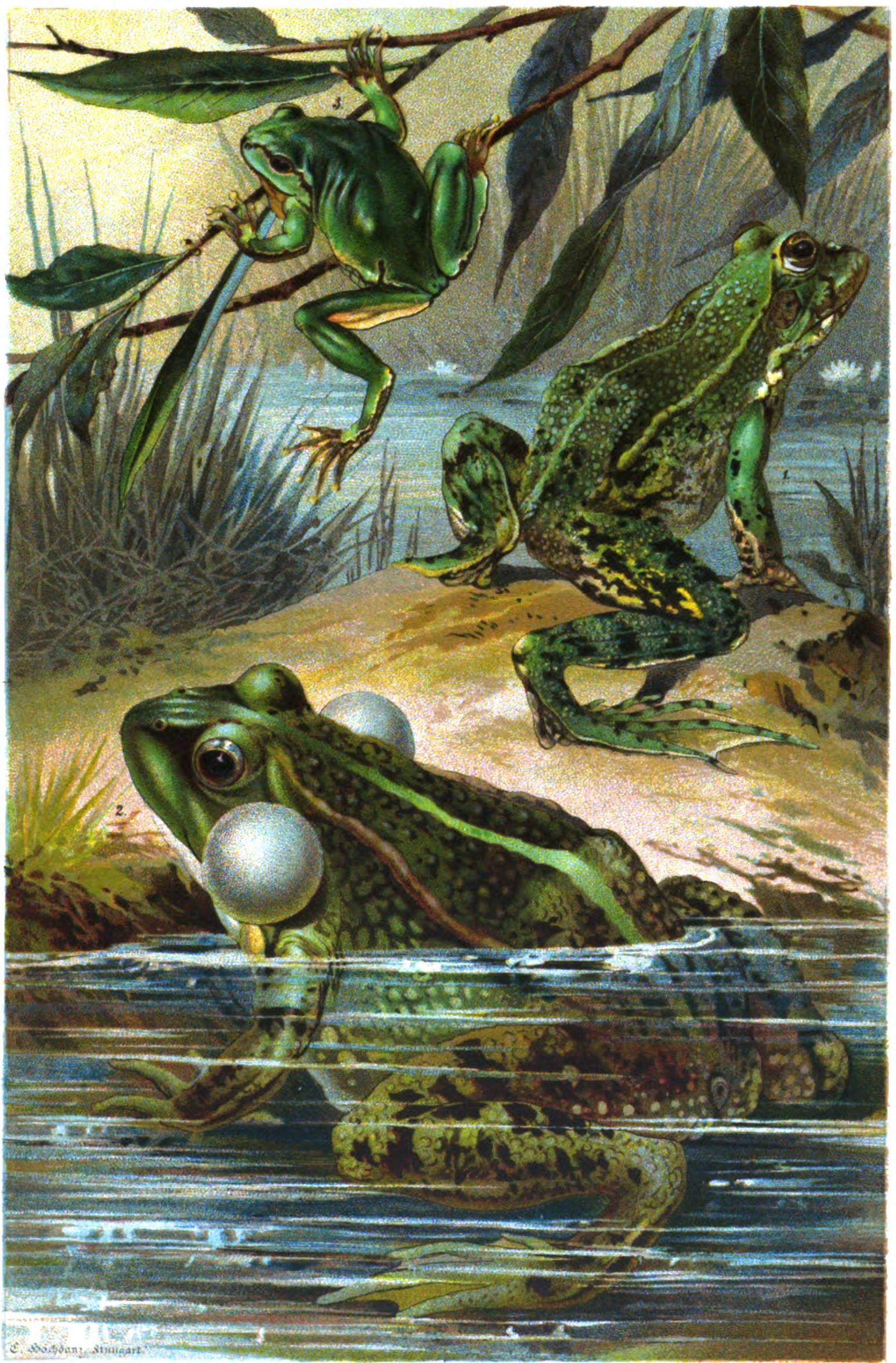 1. Wasserfrosch (Rana esculenta). 2. Seefrosch (Rana esculenta ridibunda). 3. Laubfrosch (Hyla arborea).